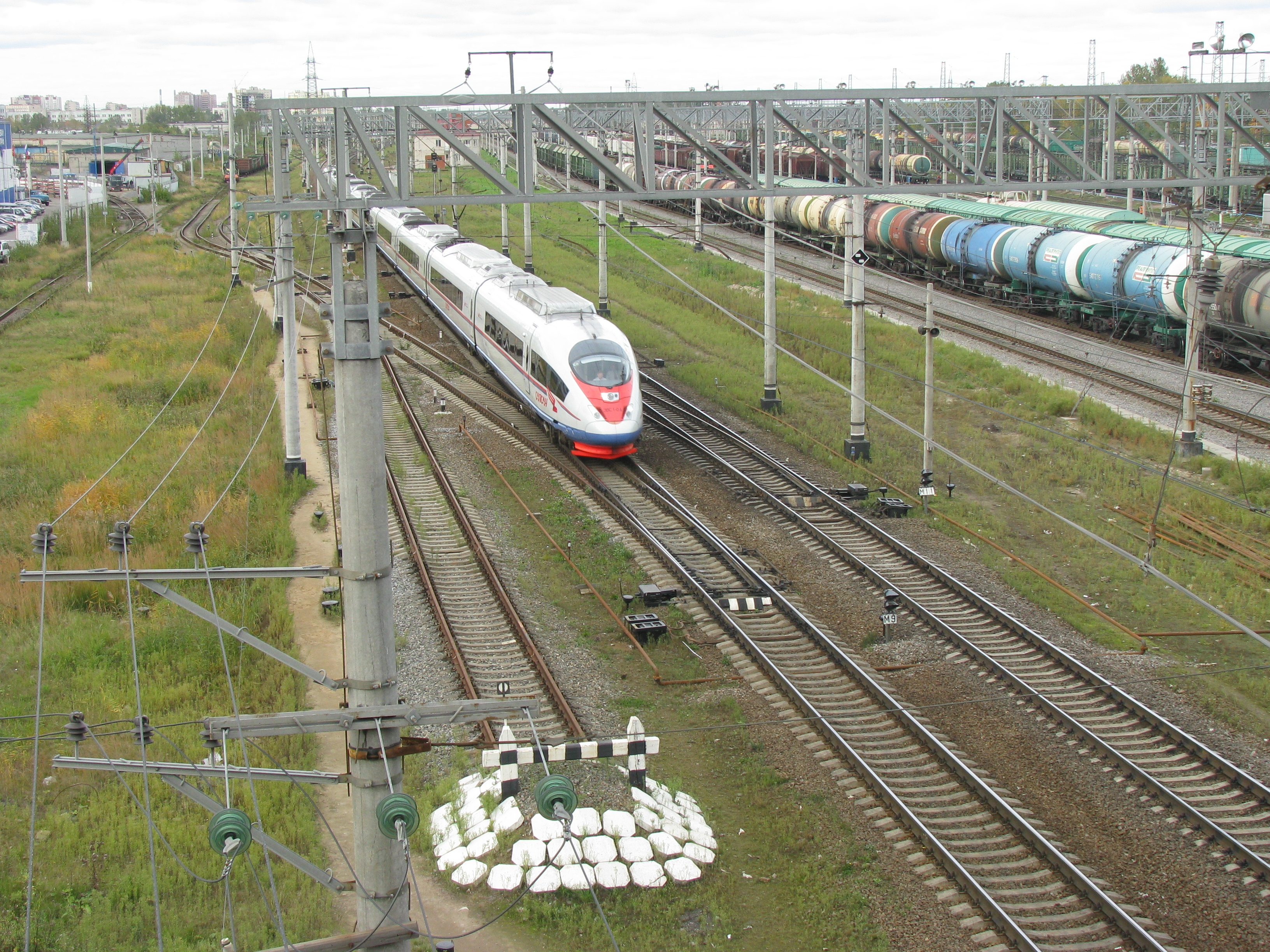 Электропоезд "Сапсан" проходит через мост Александровской фермы